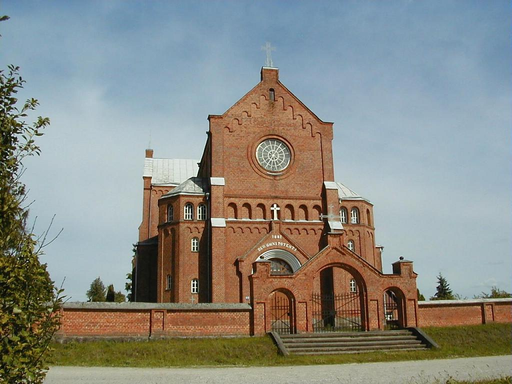 Kalupes katoļu baznīca 2002-06-29